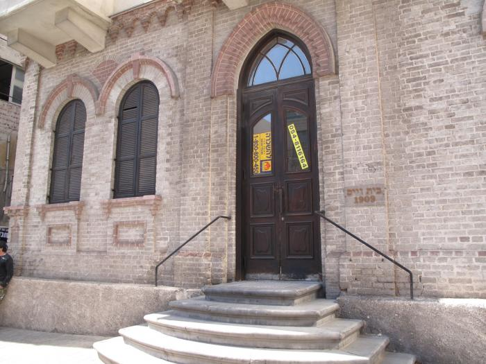 בית לשימור ושיחזור ברחוב הרצל